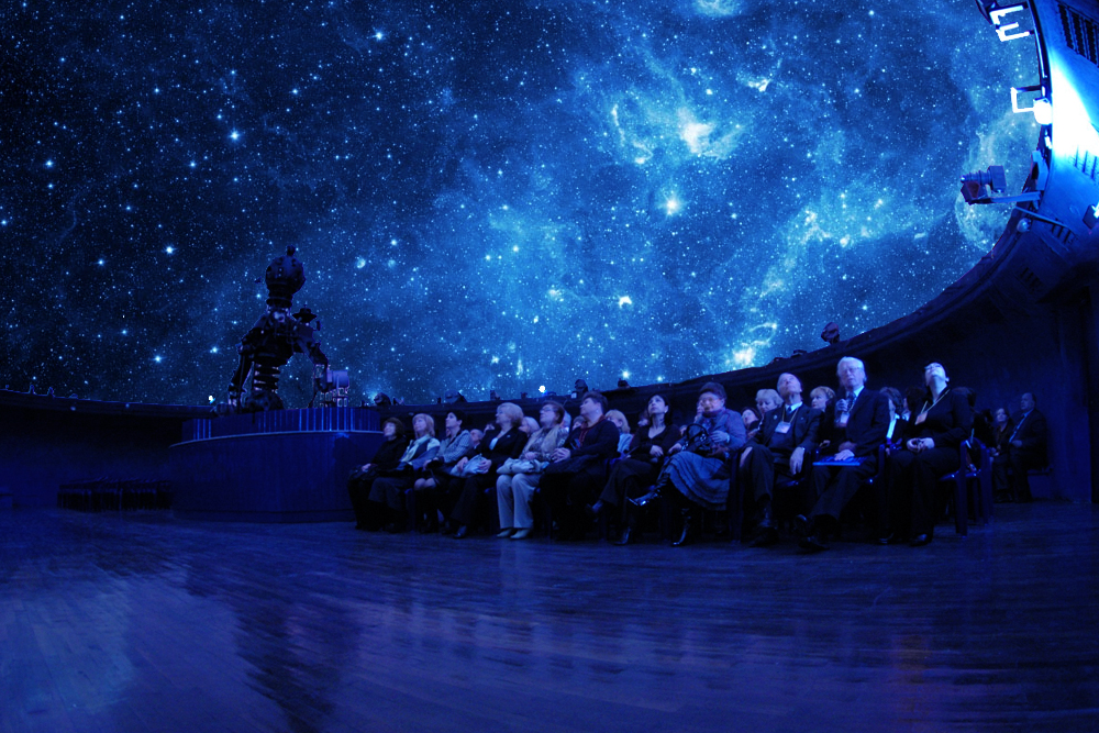 Звёздный зал Планетария входит в число крупнейших в России.